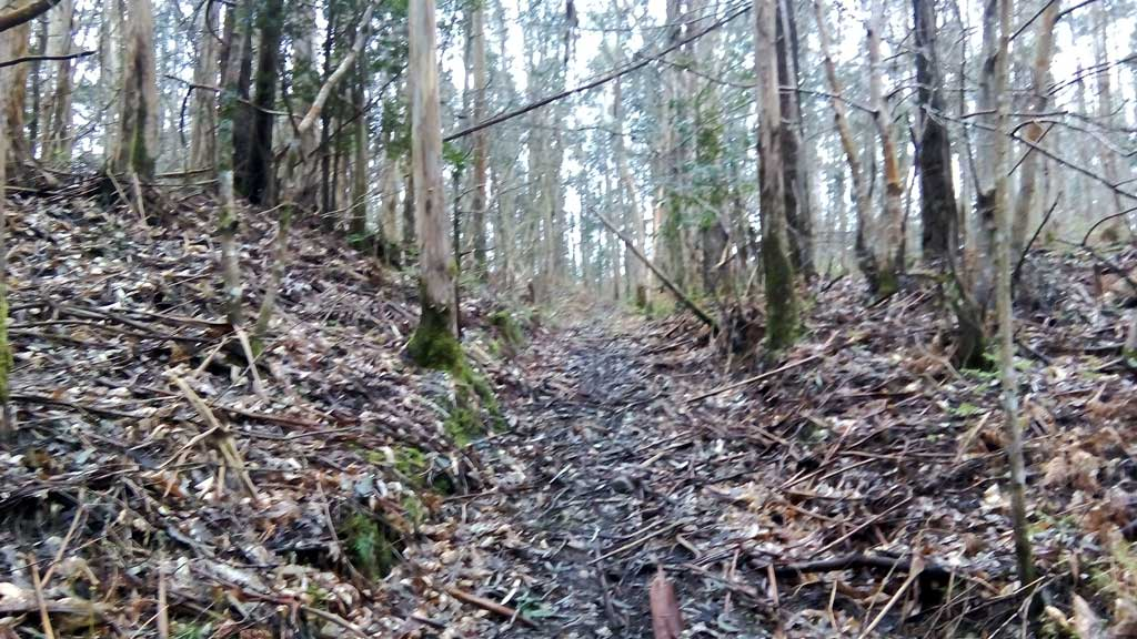 Castro das Croias, acceso ao castro.